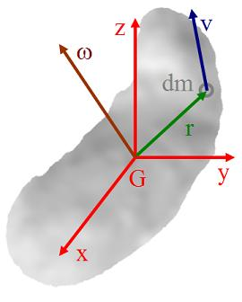 計算角動量